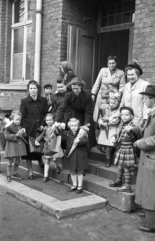 Schulanfänger, Urdenbach, 3. April 1953